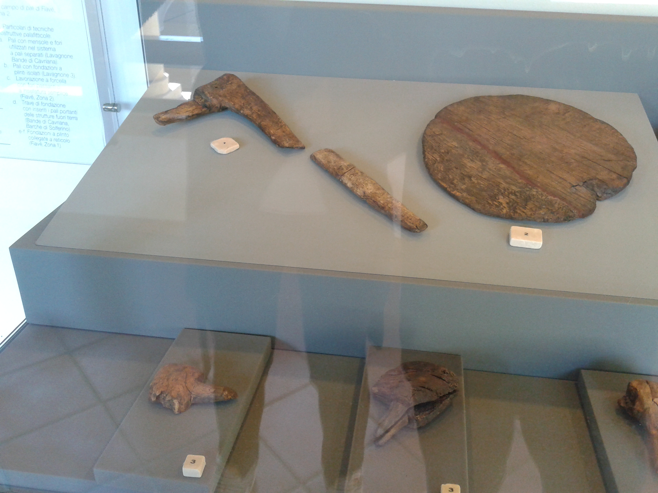 Utensili in legno conservati al Museo Archeologico Giovanni Rambotti